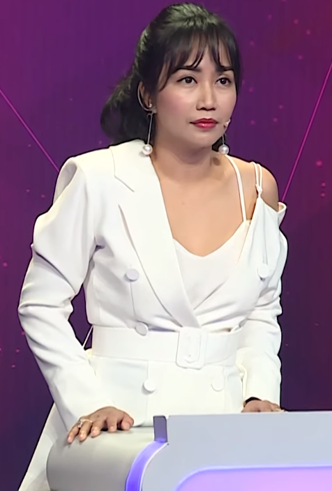 Ốc Thanh Vân, ảnh chụp màn hình từ video của BEE Entertainment / Giải Trí (screen capture from video of BEE Entertainment / Giải Trí).